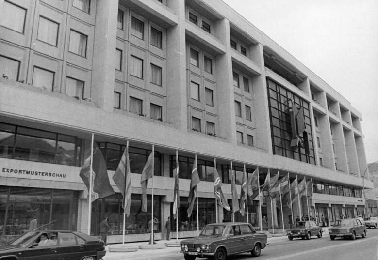 ADN-ZB Mittelstädt 5.7.84 Berlin: das Haus der Sowjetischen Wissenschaft und Kultur in der Friedrichstraße ist feierlich eröffnet worden. Auf 20.000 Quadratmetern Fläche bietet das repräsentative gebäude mit Sälen, Bibliotheken, Ausstellungsräumen, Filmothek, Sprachkabinetten und Presezentrum umfangreiche Möglichkeiten zur Information über die Sowjetunion